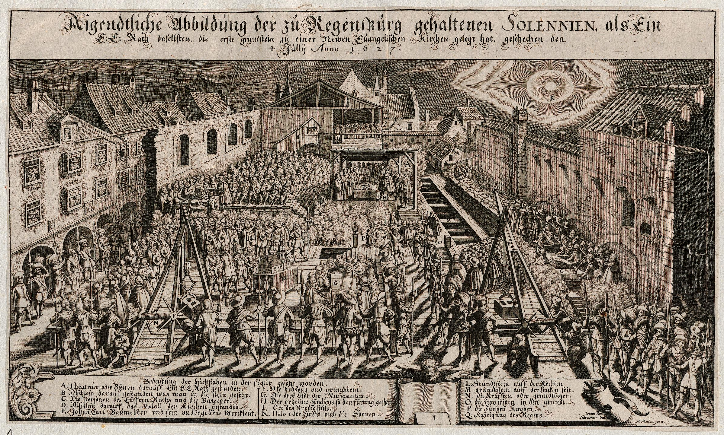 Grafik aus dem Klebeband Nr. 15 der Fürstlich Waldeckschen Hofbibliothek Arolsen Motiv: Feierliche Grundsteinlegung der evangelischen Dreieinigkeitskirche in Regensburg am 4. Juli 1627 "Aigendtliche Abbildung der zu Regenspurg gehaltenen Solennien, als Ein E. E. Rath daselbsten, die erste grundstein zu einer Newen Euangelischen Kirchen gelegt hat, geschehen den 4 Jullij Anno 1627"